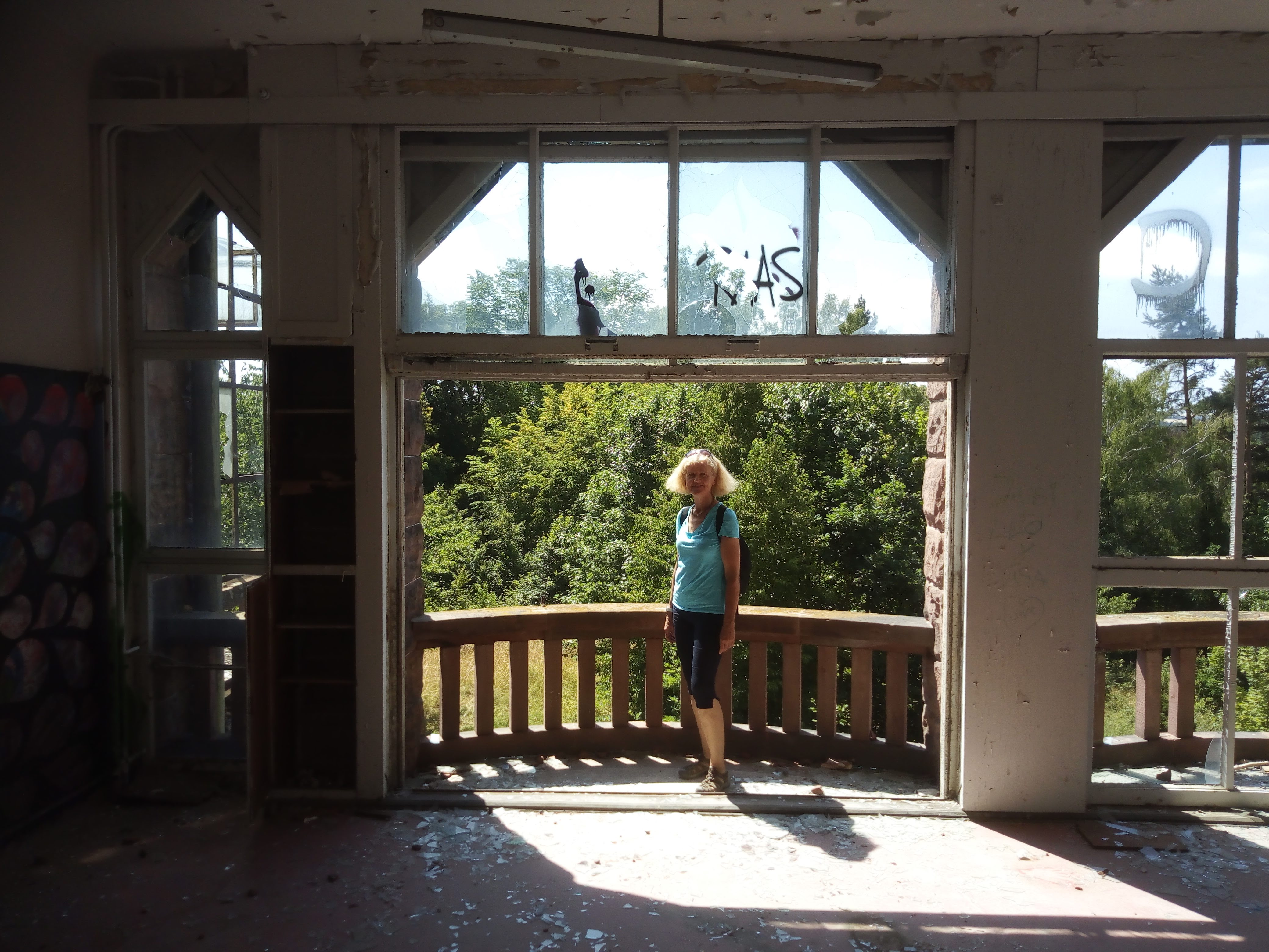 Sophienheilstätte Bad Berka-München